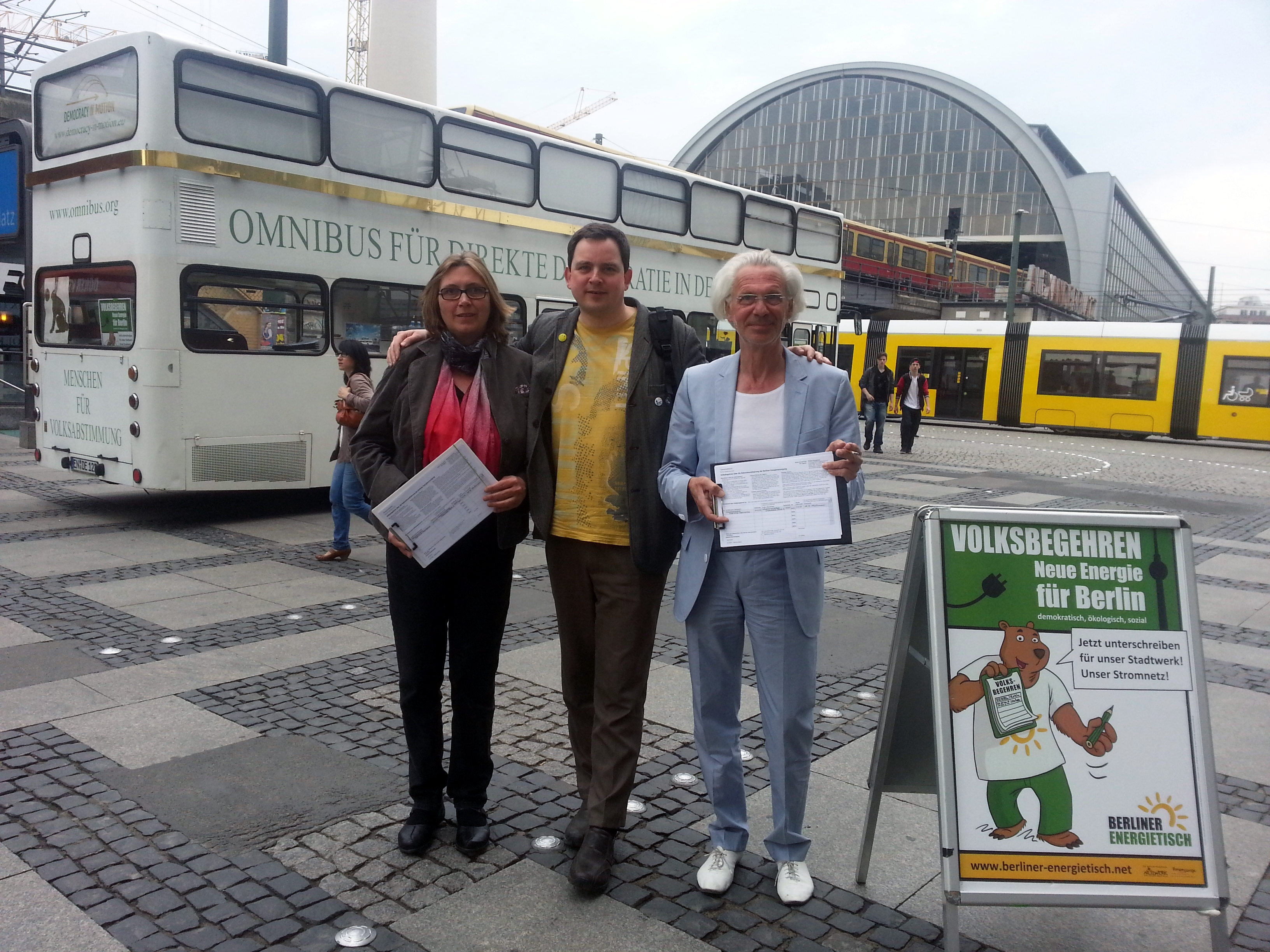 Omnibus für direkte Demokratie sammelt auf seiner Berlin-Tour am Alexanderplatz Unterschriften für das Volksbegehren Neue Energie für Berlin des Berliner Energietisch.